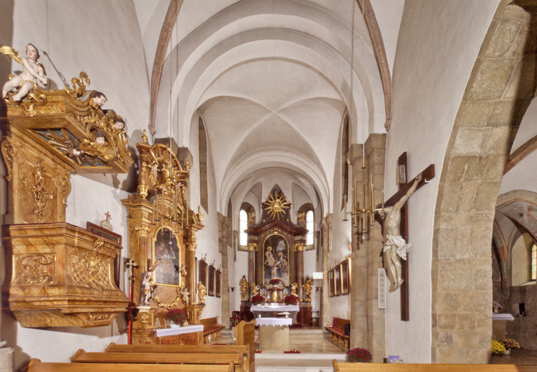 Kirche Altlichtenwarth, Hauptschiff